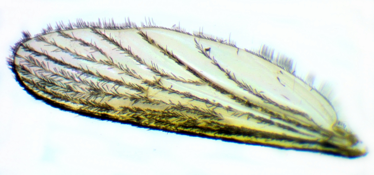 Переднее крыло комара обыкновенного (лат. Culex pipiens)